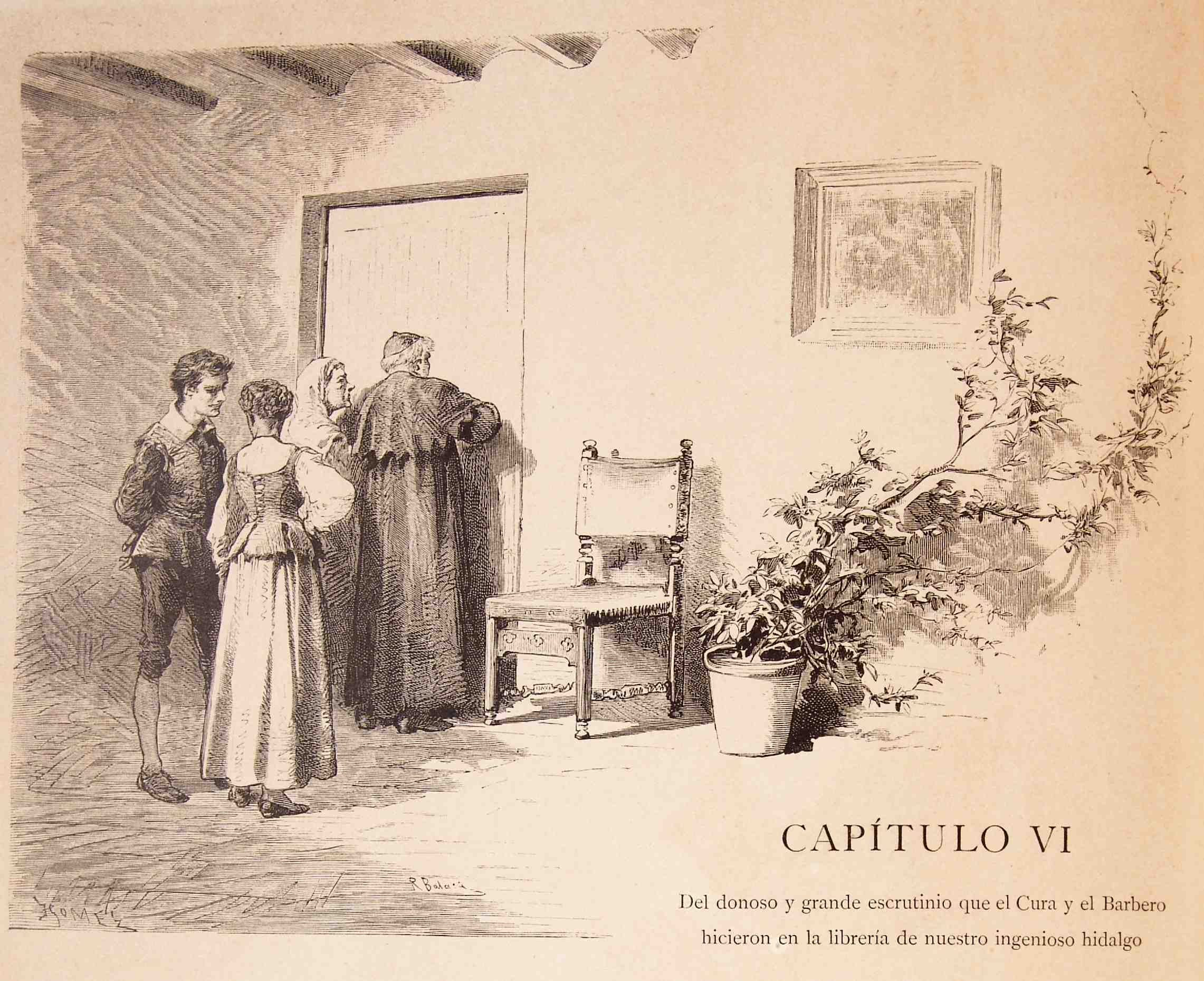 202_019_quijote_cap06